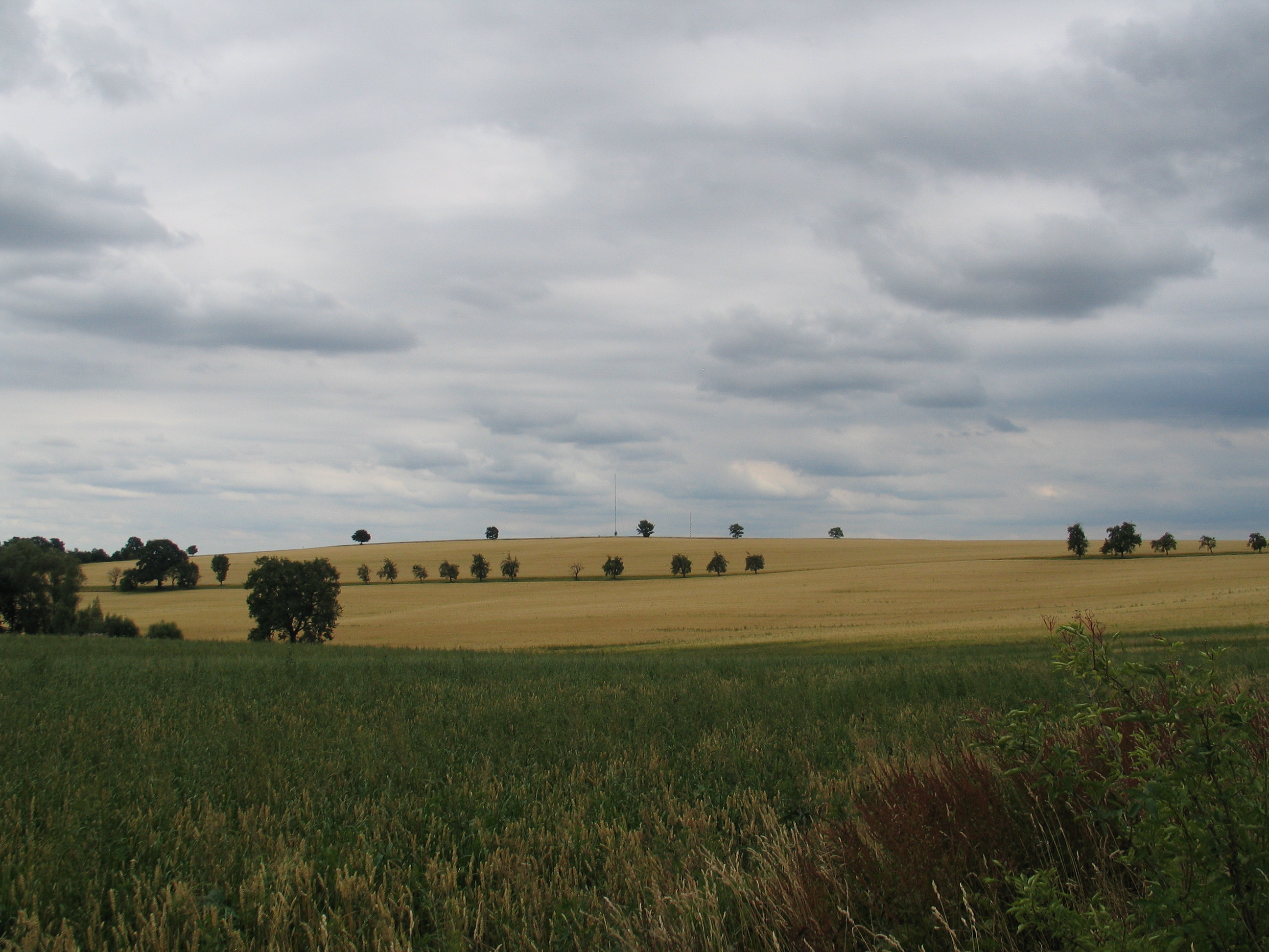 Blick auf die Baeyerhöhe (Bildmitte), die höchste Erhebung des Landkreises Meißen